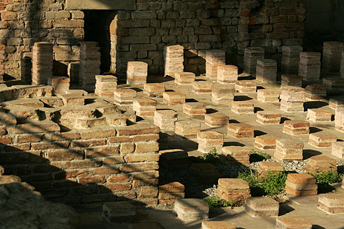 Avenches / Aventicum: Thermes de Perret (Thermes du Forum)